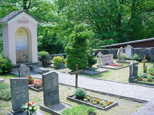 Doppelgrab von Alfred und Gisela Andersch in Berzona im Valle Onsernone bei Locarno